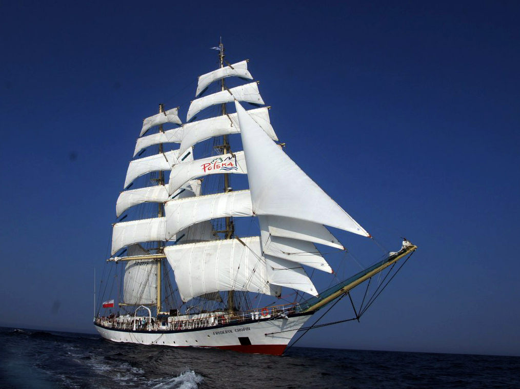 STS Chopin, 2011, Atlantyk, Szkoła pod Żaglami, na Atlantyku z boku.